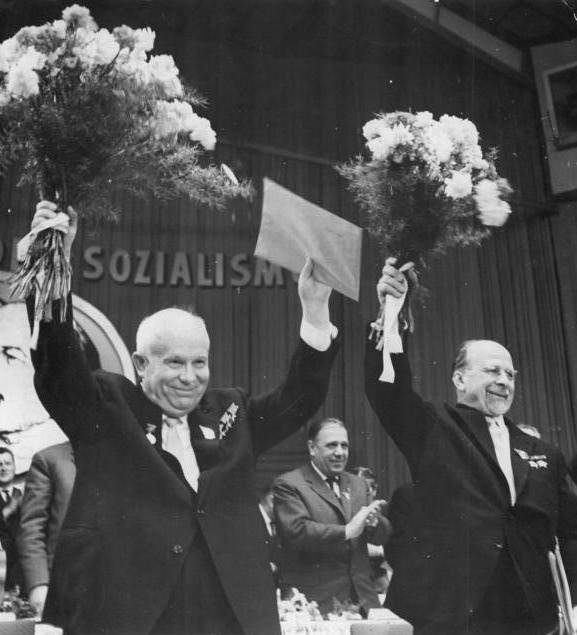 Zentralbild Kollektiv Me-Qu 21.1.1963 VI. Parteitag der SED vom 15.-21.1.1963 in der Werner-Seelenbinder-Halle in Berlin (6.Tag) UBz: Ein Beifallssturm erfüllte zum Abschluß des Parteitages die Werner-Seelenbinder-Halle. Noch einmal winkten der Erste Sekretär des ZK der SED Walter Ulbricht (rechts) und der Erste Sekretär des ZK der KPdSU, N.S. Chruschtschow, vom Präsidium mit den prächtigen Blumensträußen.(Sturm)